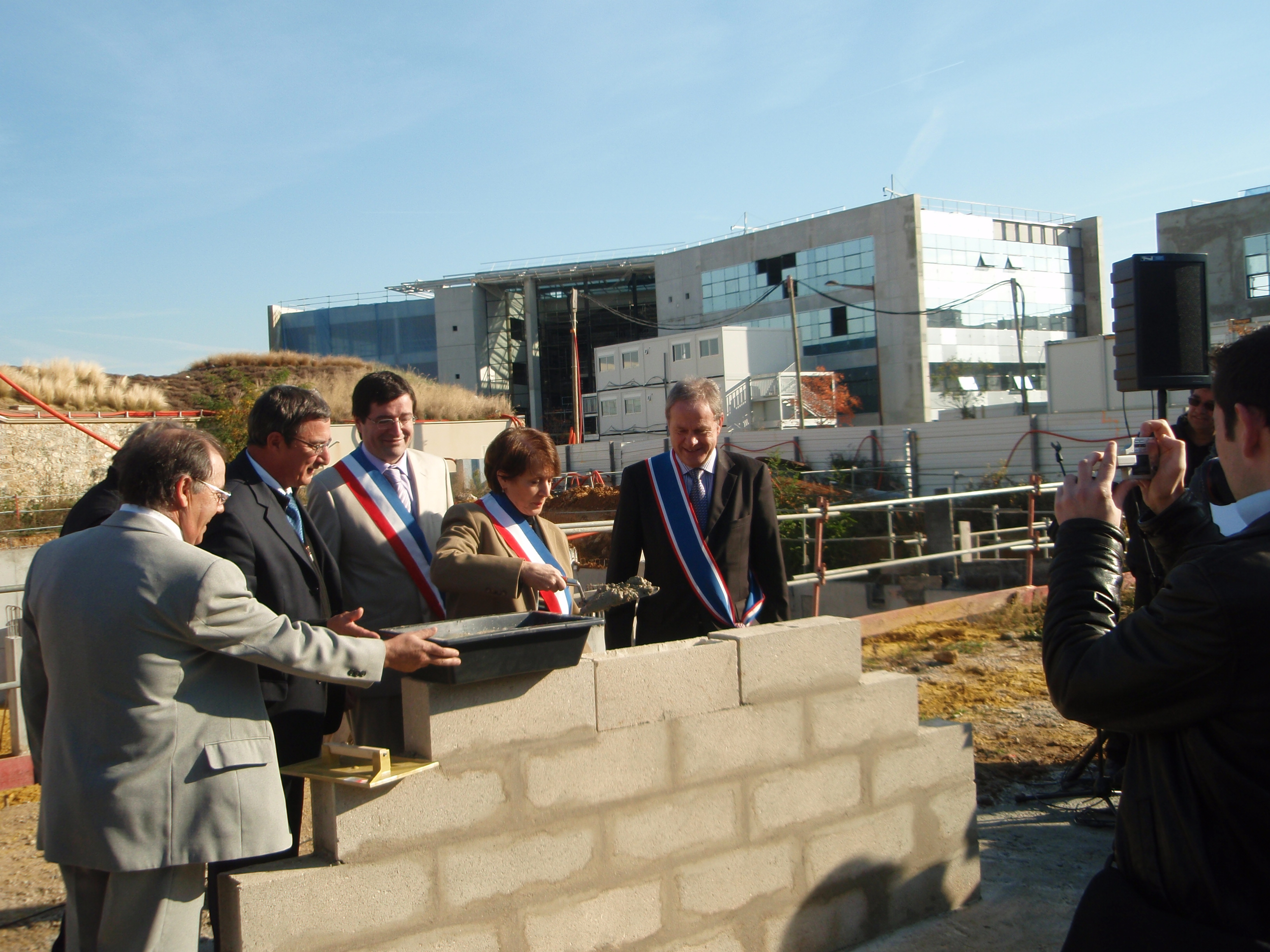 Première pierre de l'école municipale de musique de Guyancourt en présence de Madame Tasca ancienne ministre et sénatrice des yvelines, Monsieur Deligné maire de Guyancourt et Monsieur Cadalbert Président de la CA.